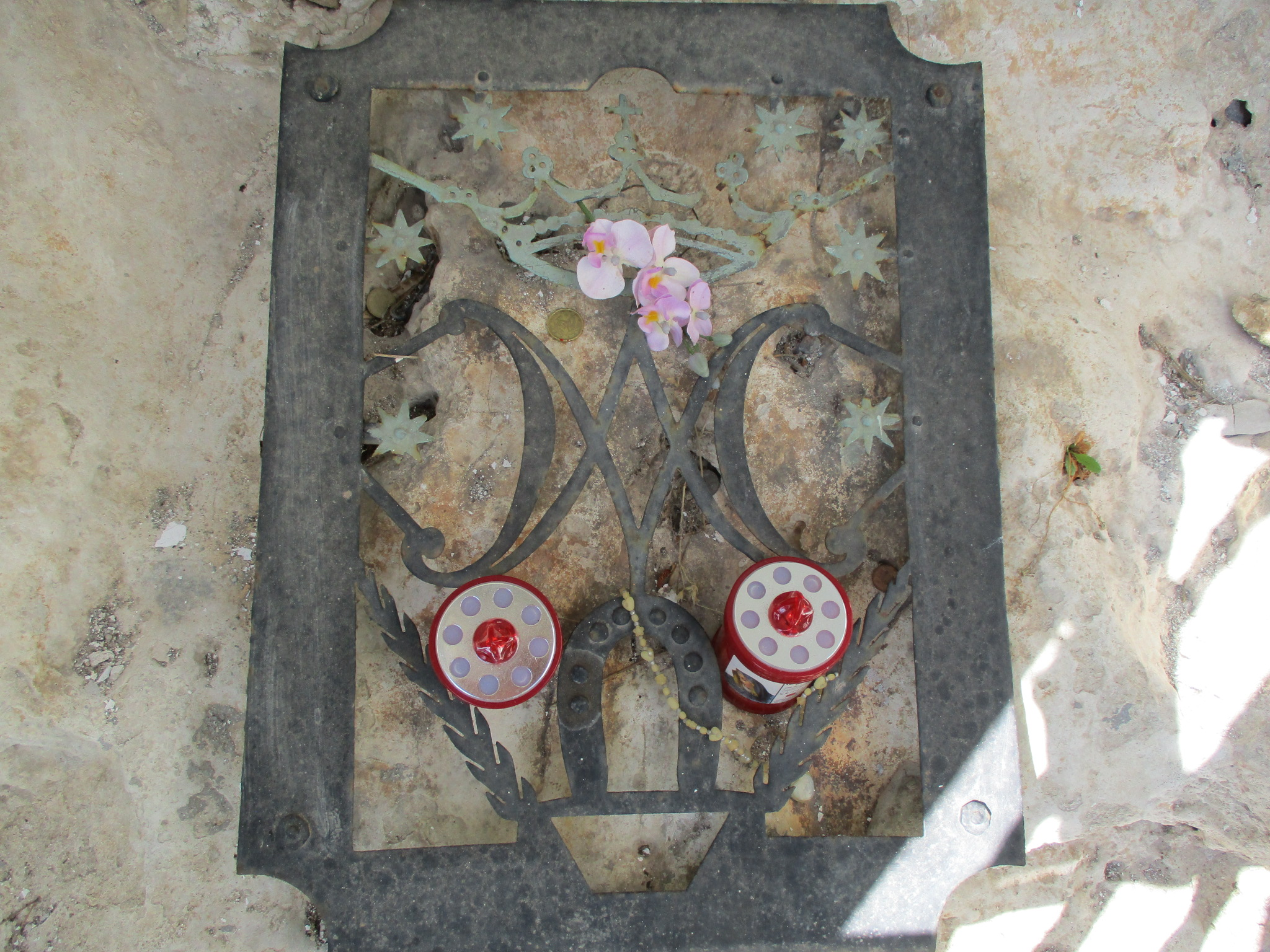 Roccia con impresso il calco dello zoccolo del cavallo che trasportò la Madonna